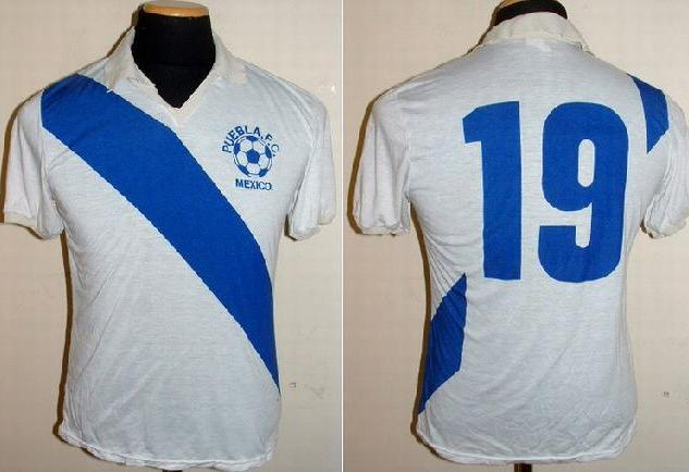 1982 champion jersey